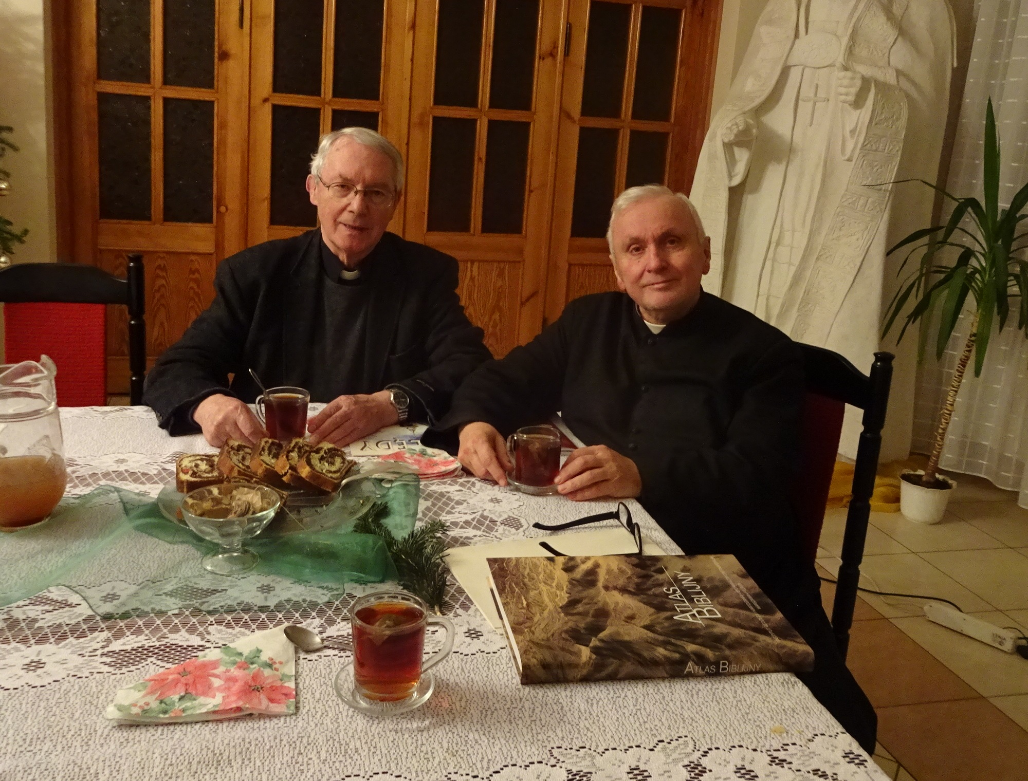 Wigilia 2018-12-24, parafia Jana i Pawła, Gocławek, Jerzy Banak i Stanisław Jankowski